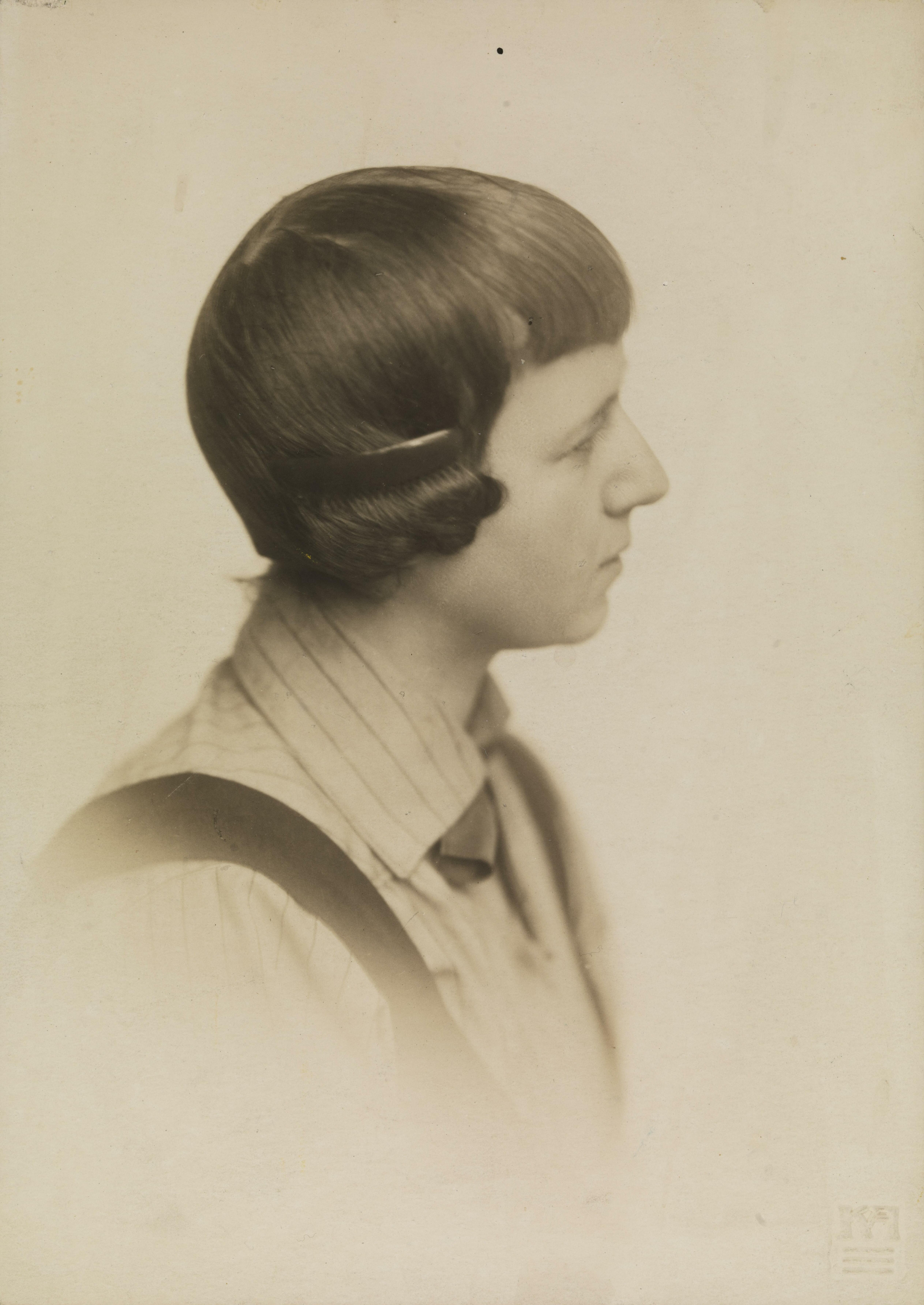 Beskrivelse / Description: Pauline Hall var komponist og skribent. Dato / Date: 1917 Fotograf / Photographer: Karl Anderson (1867-1913) Digital kopi av original / Digital copy of original: papirpositiv, s/h Eier / Owner Institution: Nasjonalbiblioteket / National Library of Norway Lenke / Link: Bildesignatur / Image Number: blds_03526